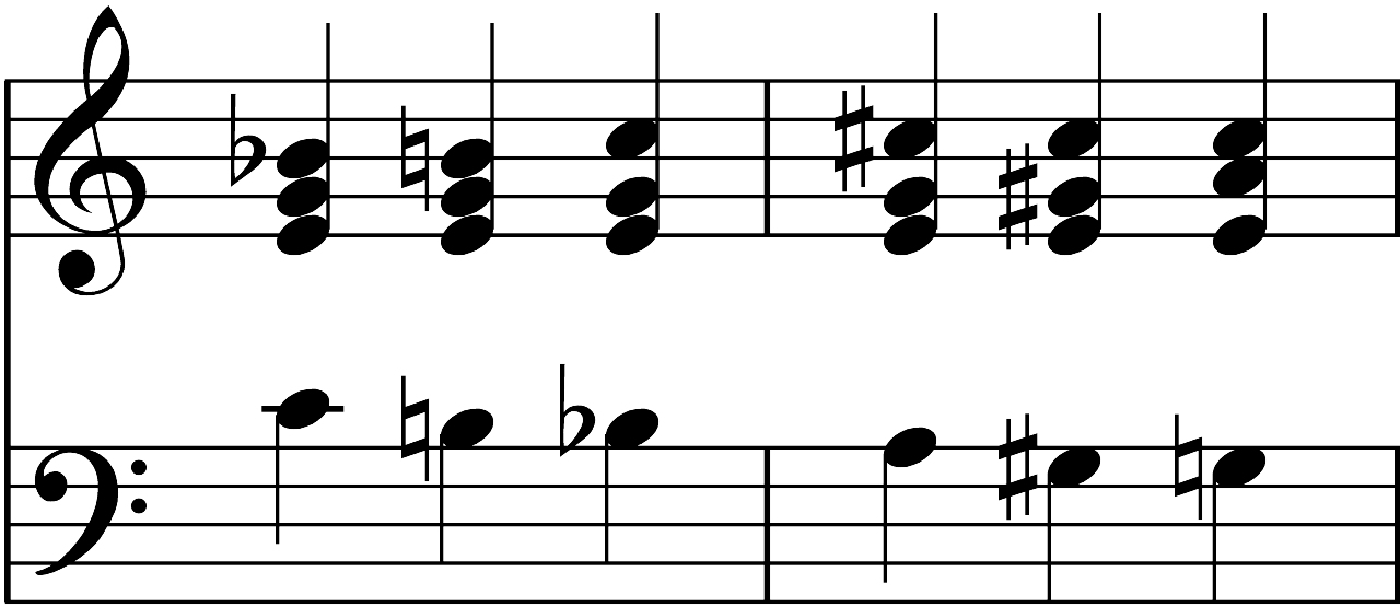 Erläuterndes Notenbeispiel, selbst verfasst